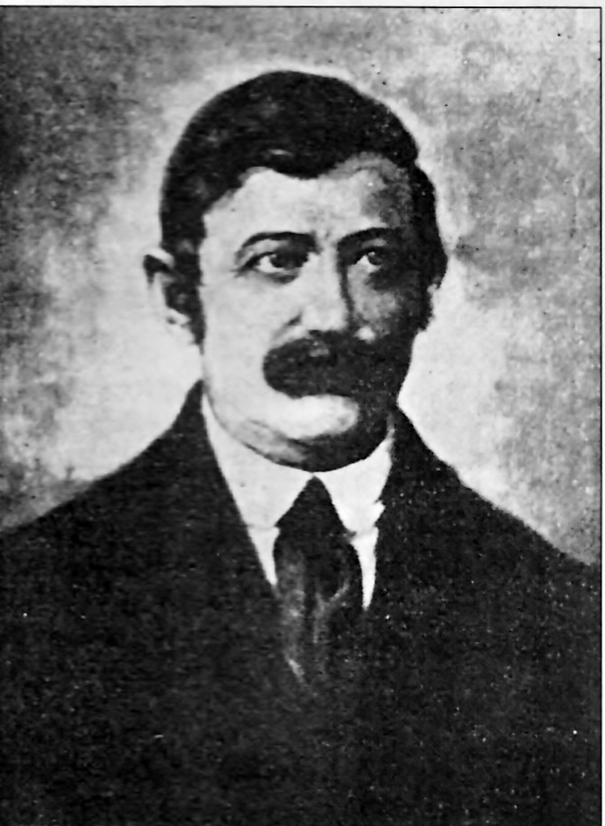 Zakladateľ Tatranských Matliarov vo Vysokých Tatrách, Matej Loisch st. z Huncoviec